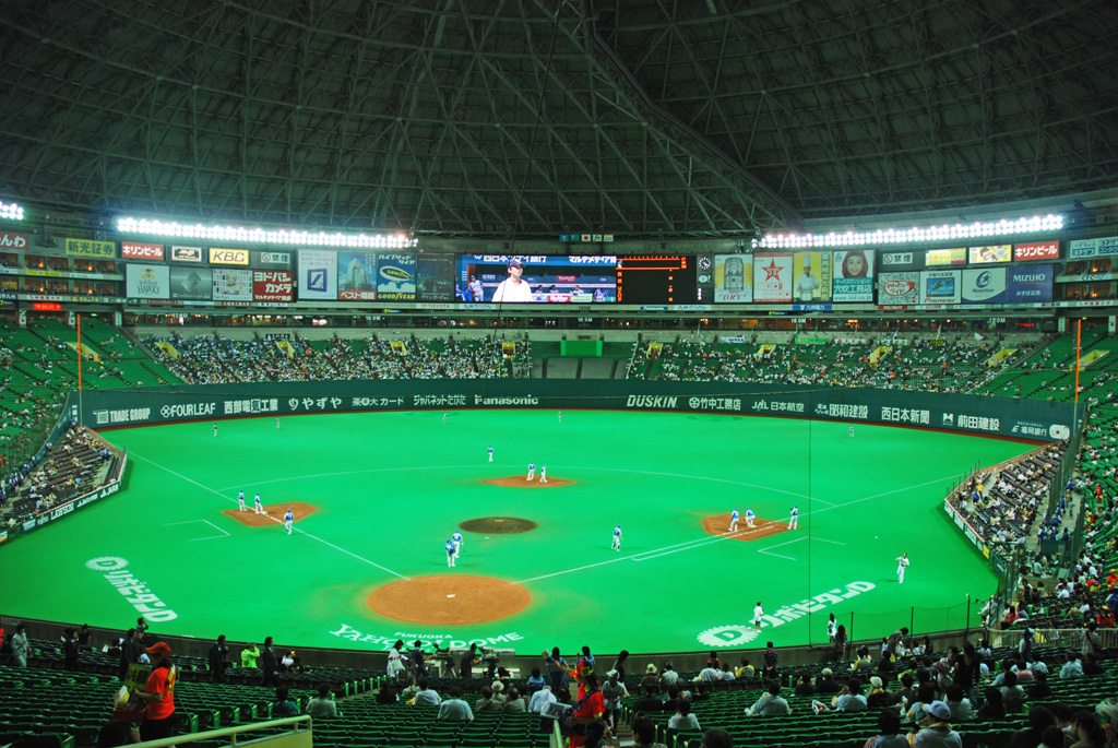 福岡ドームの館内。2007年10月5日のパ・リーグ公式戦「福岡ソフトバンクvs西武」戦のプレイボール時のもの。投稿者(Kltdexp)自身が撮影。 2007年10月20日 (土) 19:09 . . Kltdexp . . 1024×685 (341 キロバイト)